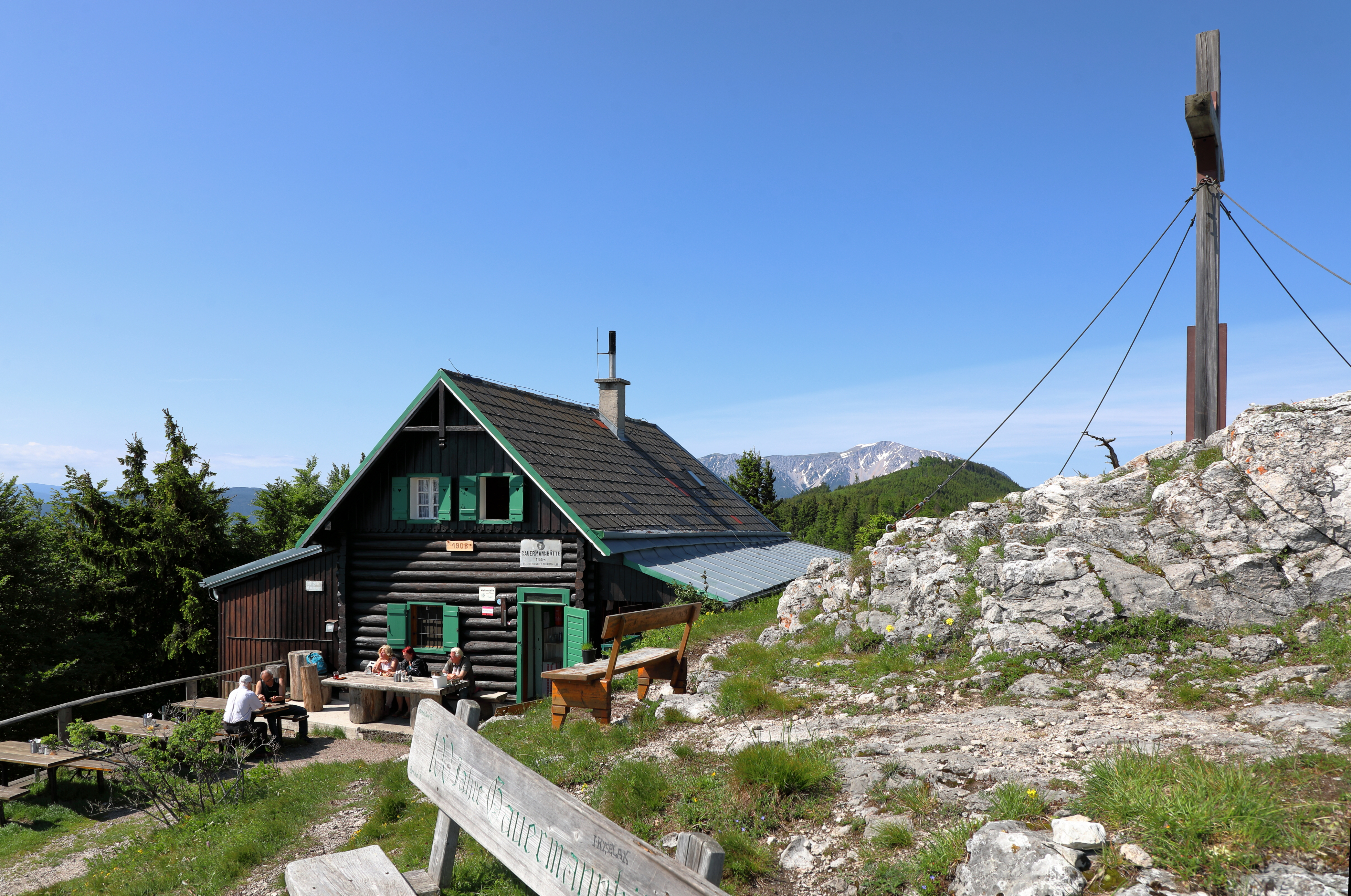 Der Gipfelbereich des 1154 m hohen Plattensteins mit der Gauermannhütte sowie dem Gipfelkreuz in der niederösterreichischen Gemeinde Miesenbach und im Hintergrund der Schneeberg.Der Plattenstein ist ein Teil des Höhenzuges Dürre Wand. Das nach dem Maler Friedrich Gauermann benannte Schutzhaus wurde 1908 eröffnet und ist im Besitz des Österreichischen Touristenklubs (ÖTK).